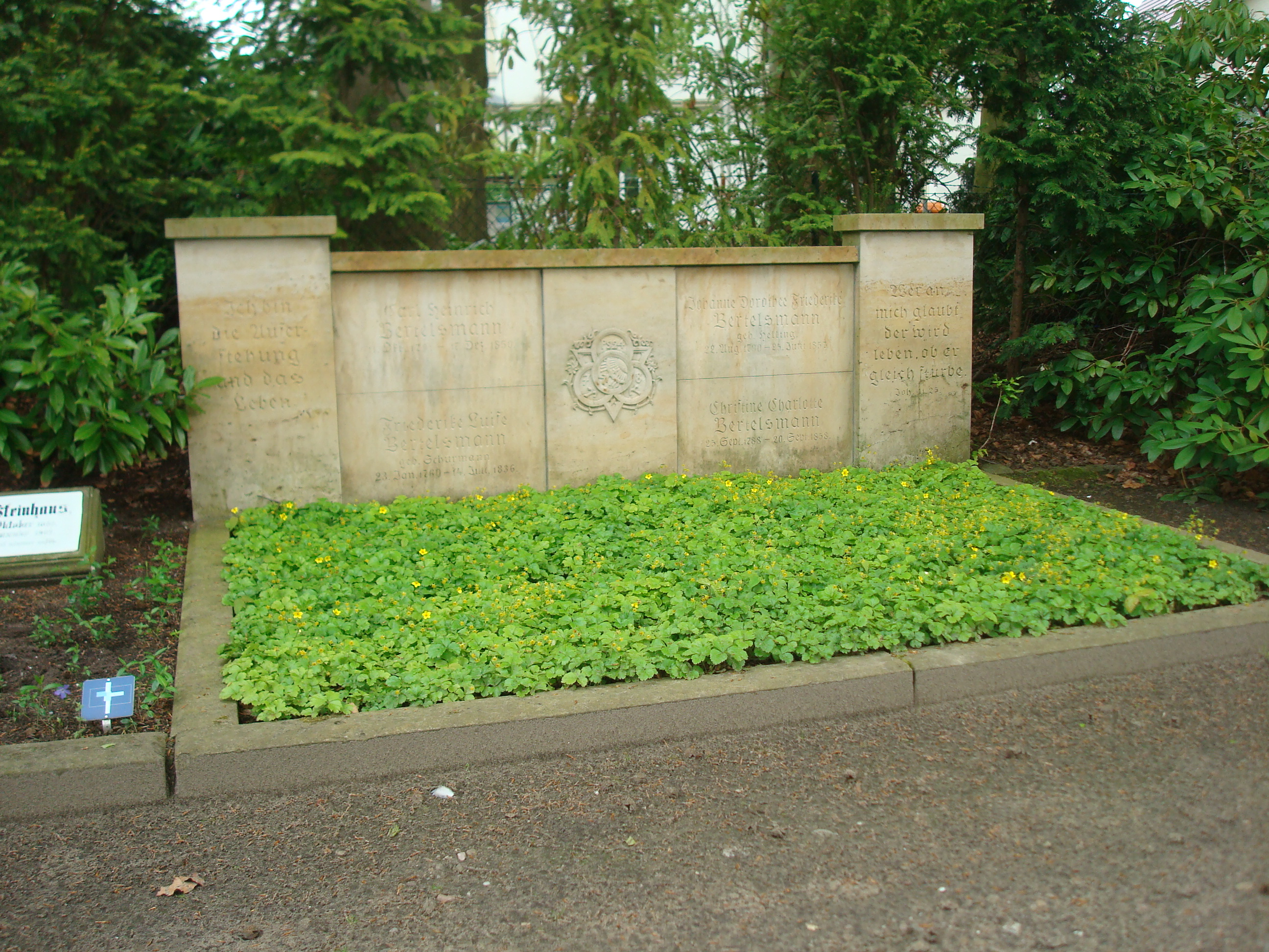 Grabstätte von Carl Bertelsmann auf dem Alten Stadtfriedhof in Gütersloh This is a photograph of an architectural monument. 208